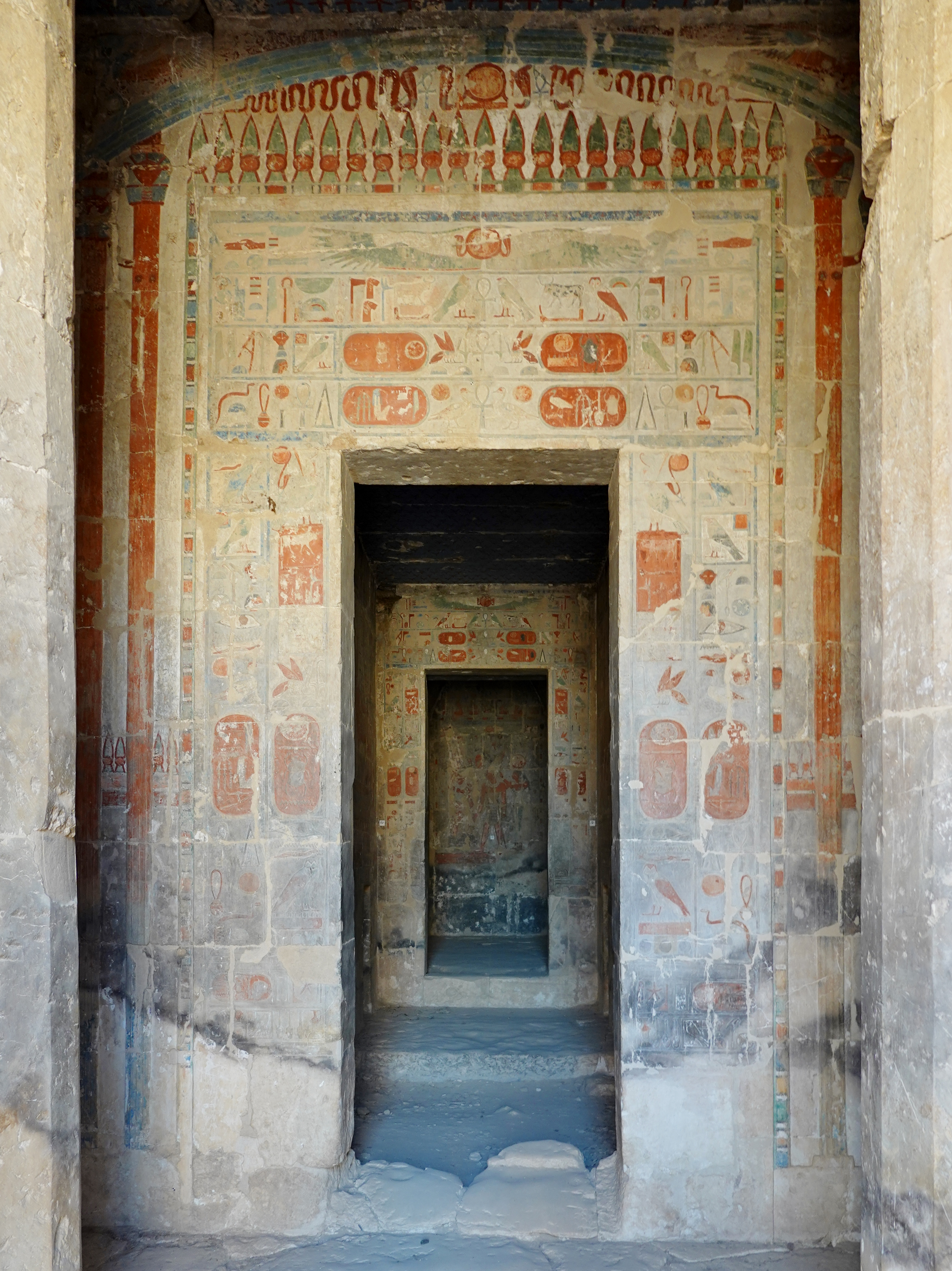 Eingang zum Heiligtum in der Hathorkapelle im Totentempel der Hatschepsut in Deir el-Bahari nordwestlich von Luxor, Ägypten